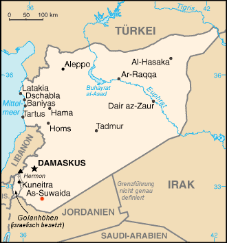 Lage von As-Suwaida in Syrien